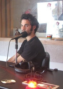 תמונה של המוסיקאי קותימן Kutiman.jpg